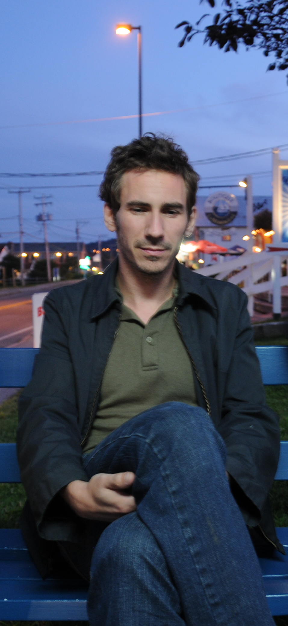 Alexandre Laferrière, Les Percéides, 3e festival International de Cinéma et d’Art